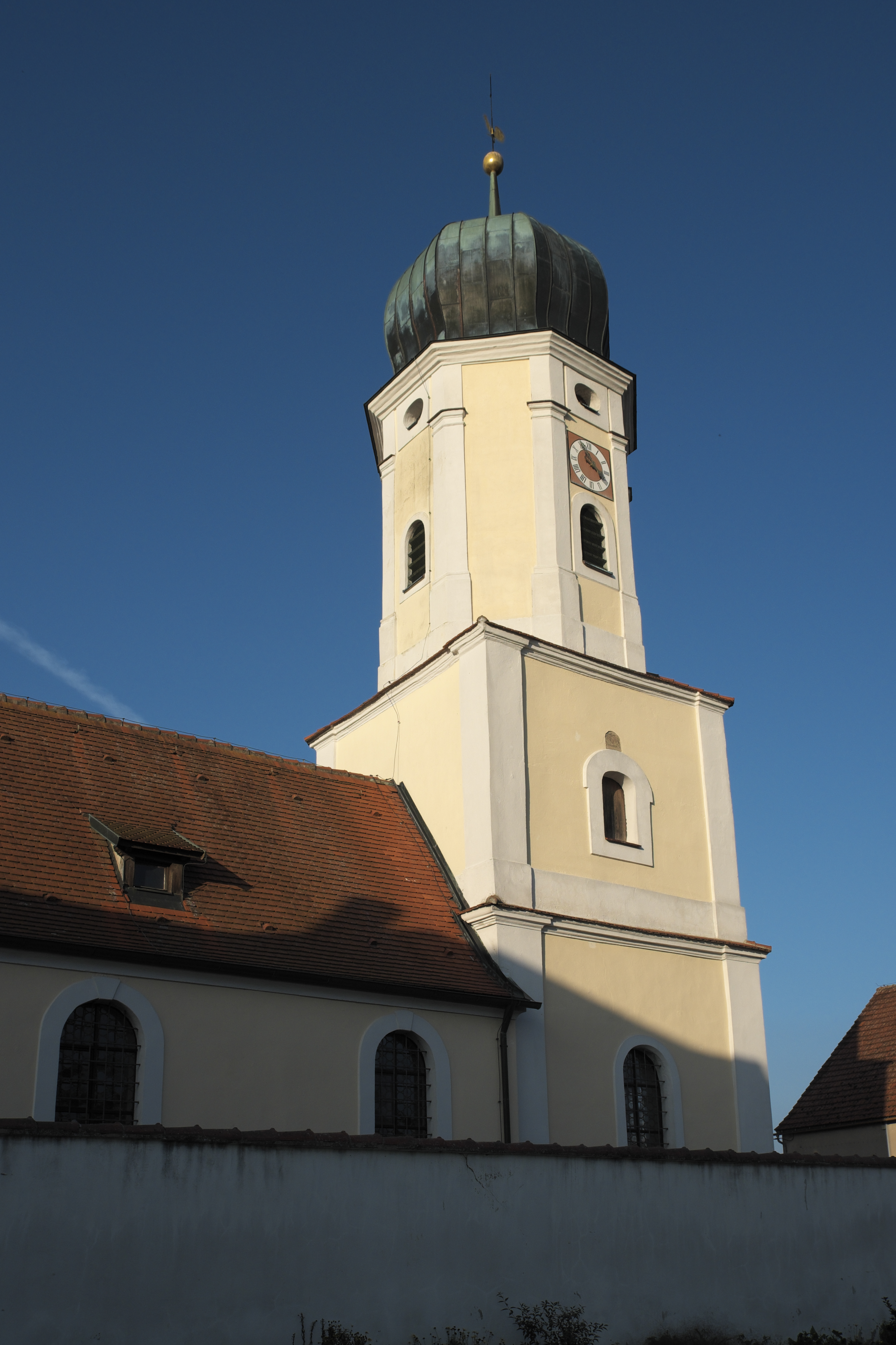 Katholische Filialkirche St. Georg, in Villersbronn, einem Ortsteil von Wilburgstetten im Landkreis Ansbach (Mittelfranken/Bayern), Chorturmkirche von 1412/17